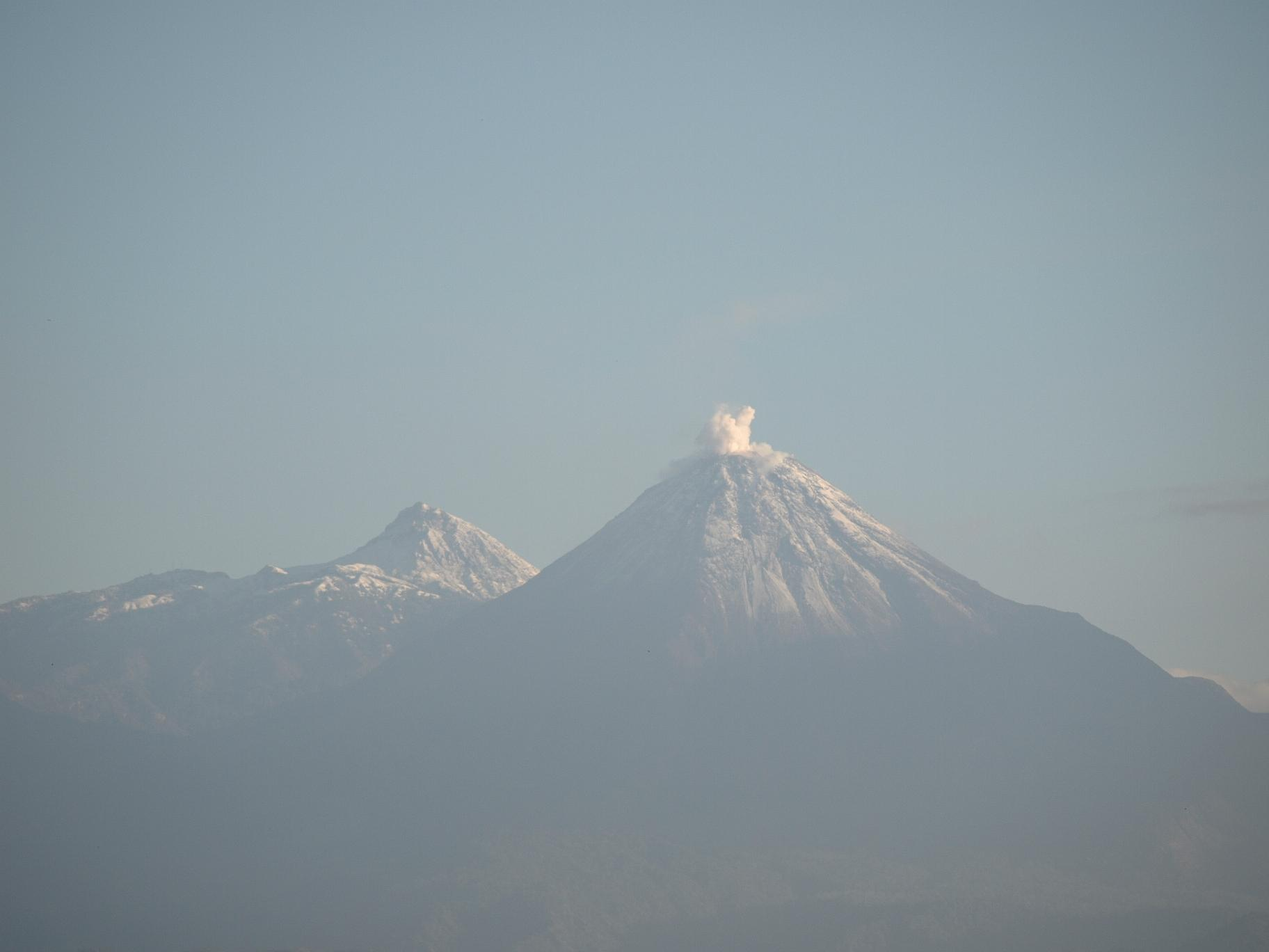 Los volcanes de Colima, vistos desde la ciudad de Colima, Estado de Colima